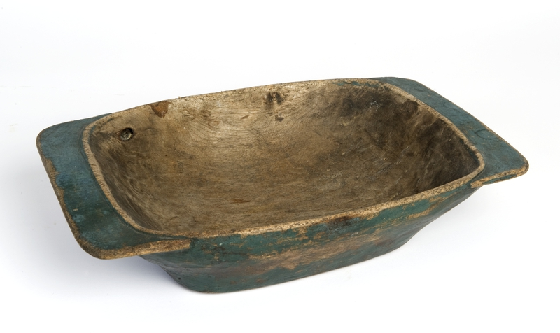 Trau fra Kvinesdal i Vest-Agder. Foto Anne-Lise Reinsfelt / Norsk Folkemuseum. NF.1923-2038.